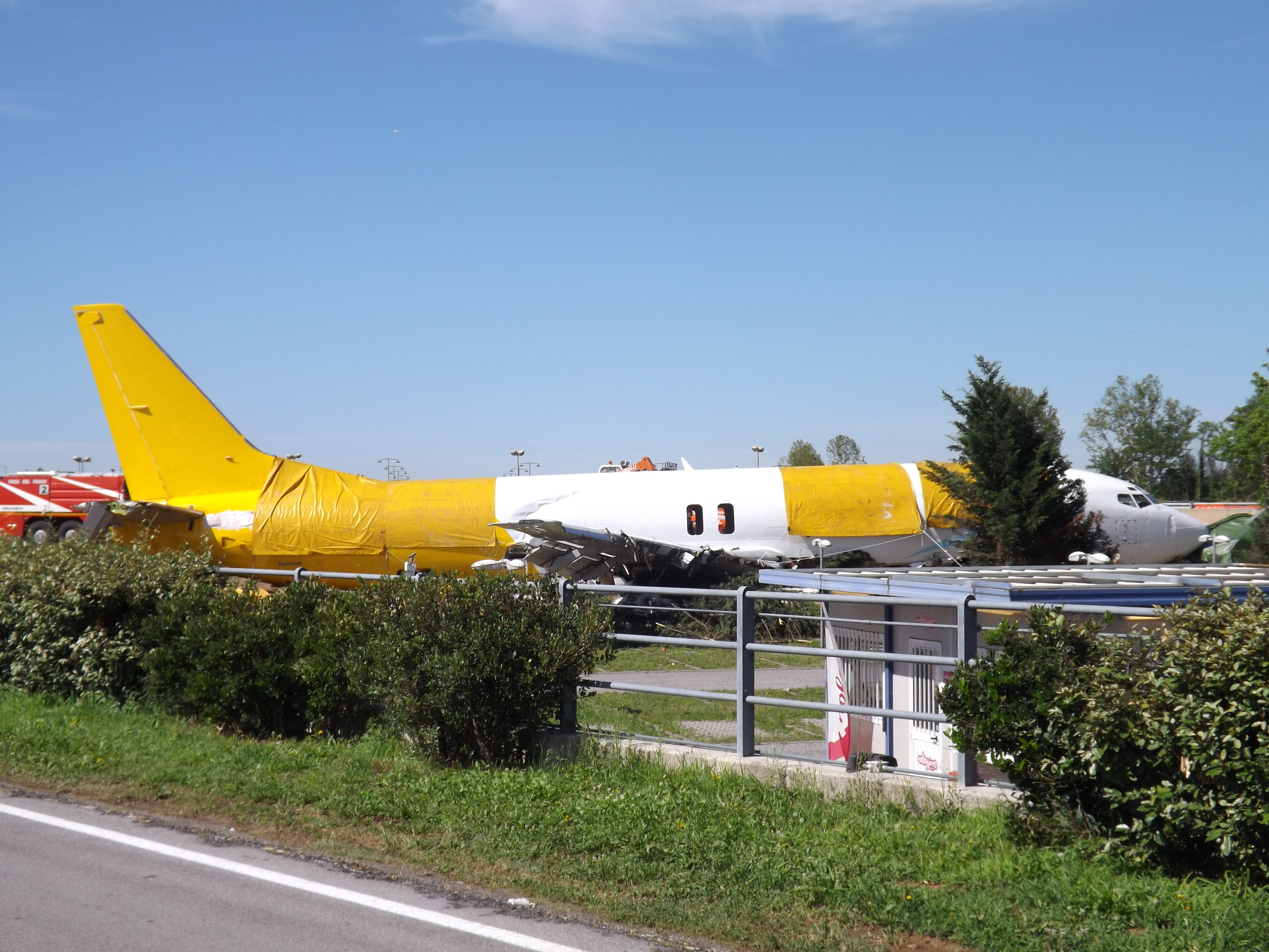 Boeing 737-476 SF uscito di pista il 5 agosto 2016 e finito sulla circonvallazione, ripreso il giorno dopo.Vedi articolo sull'incidente